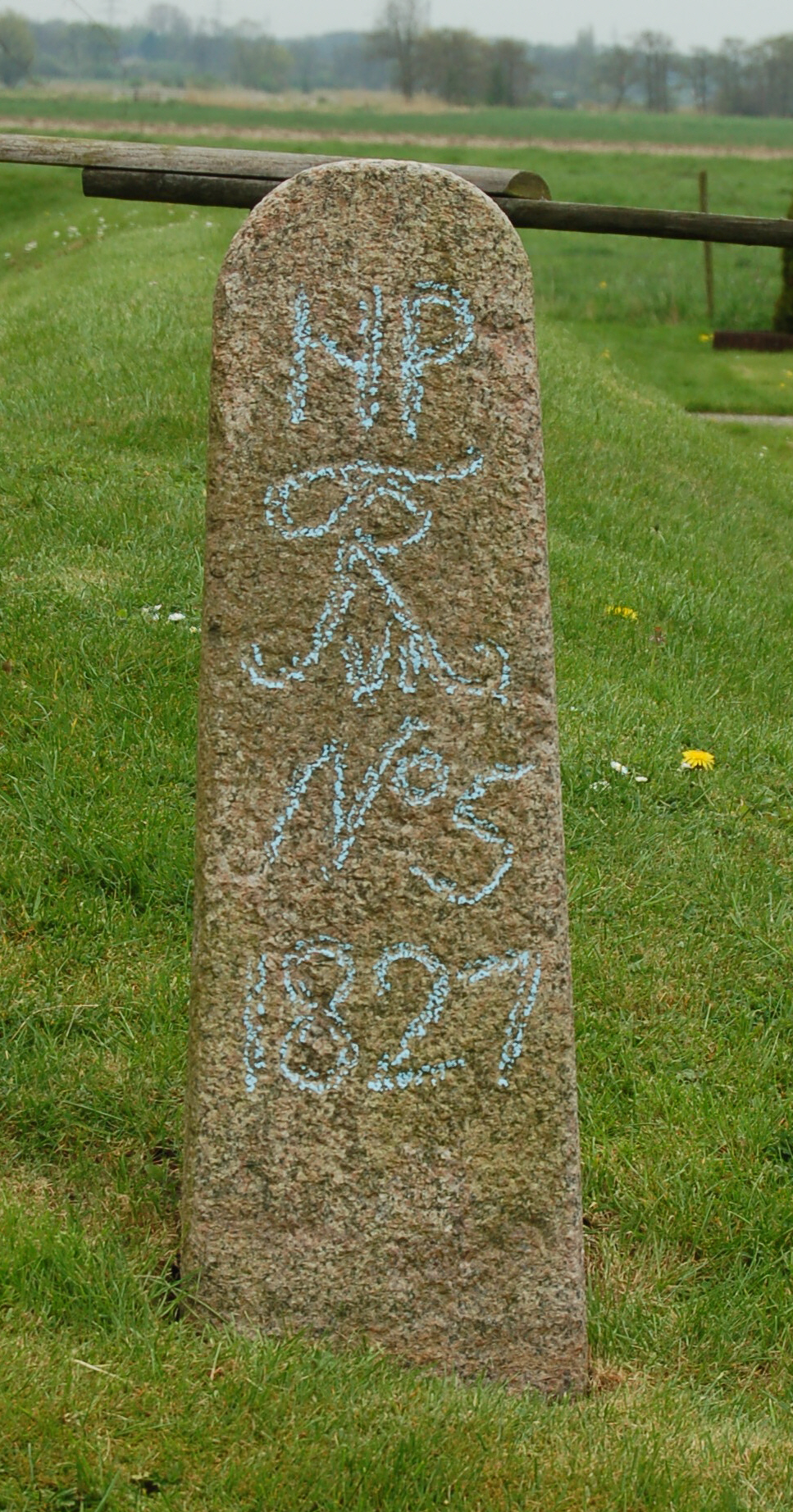 Alter Grenzstein der Herrschaft Pinneberg in Heist (Kreis Pinneberg)aus dem Jahr 1827 - eine Erinnerung an den dänischen Gesamtstaat bis in das 19. Jahrhundert.